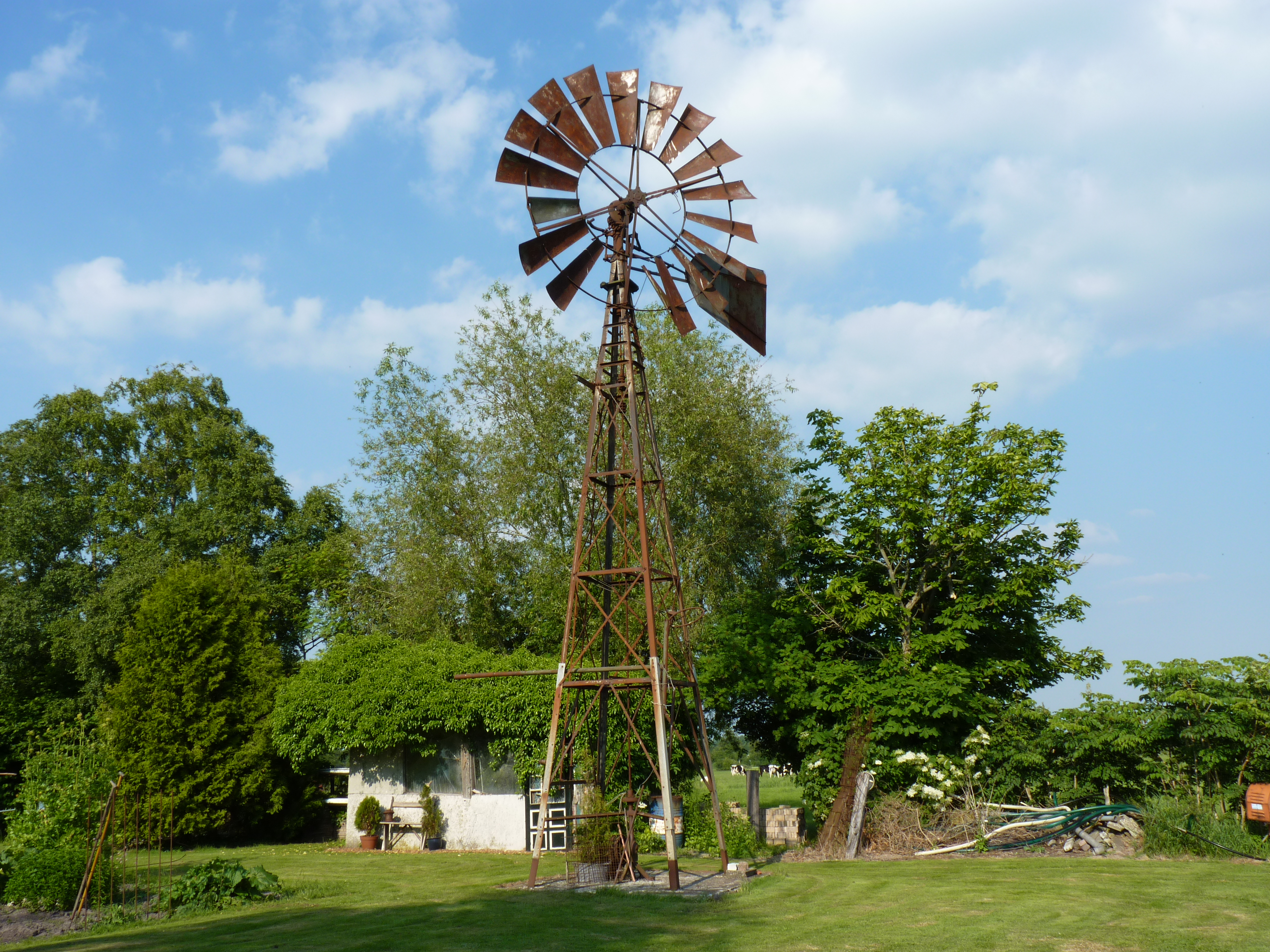 Waskemeer Windmotor